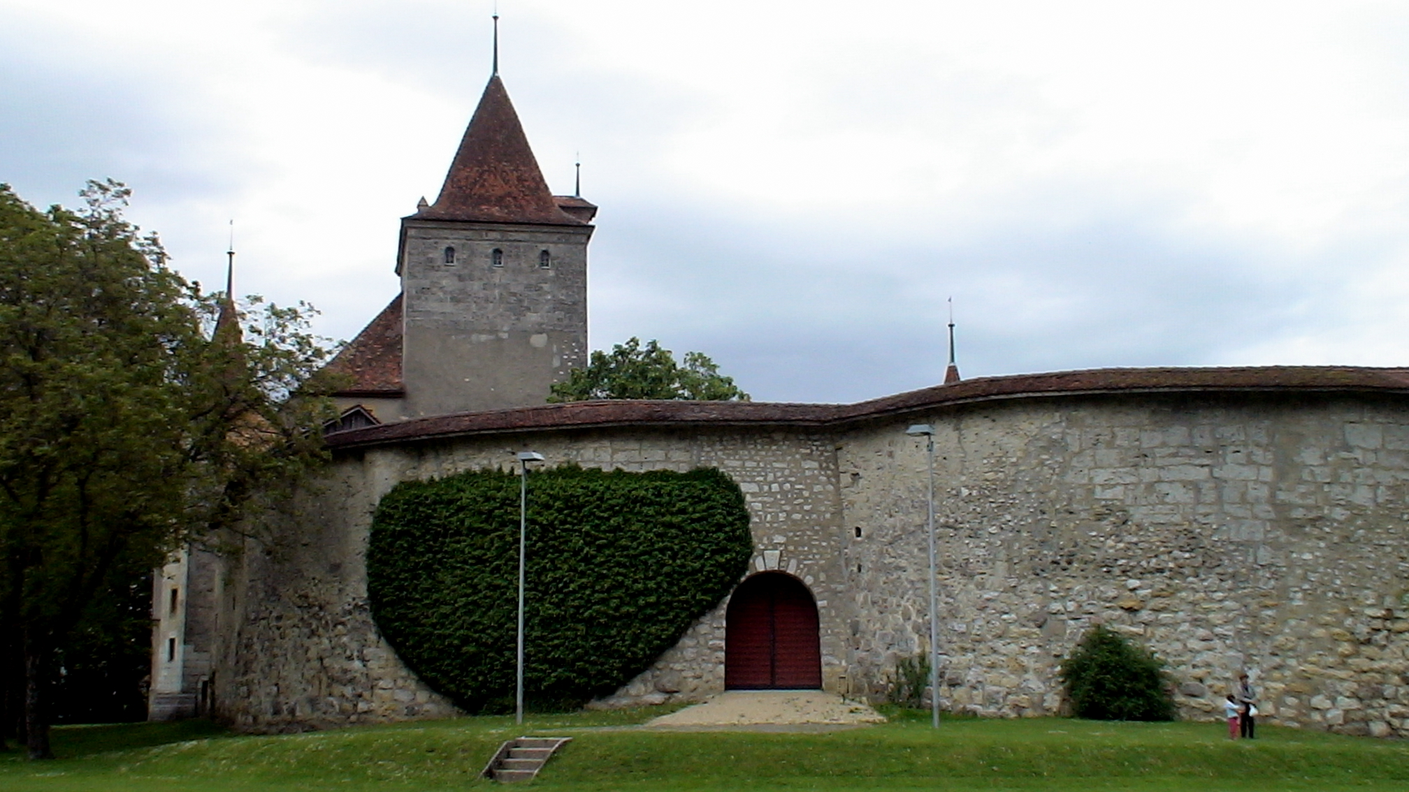 Schloss Nidau Nord Ansicht vom Schlosspark